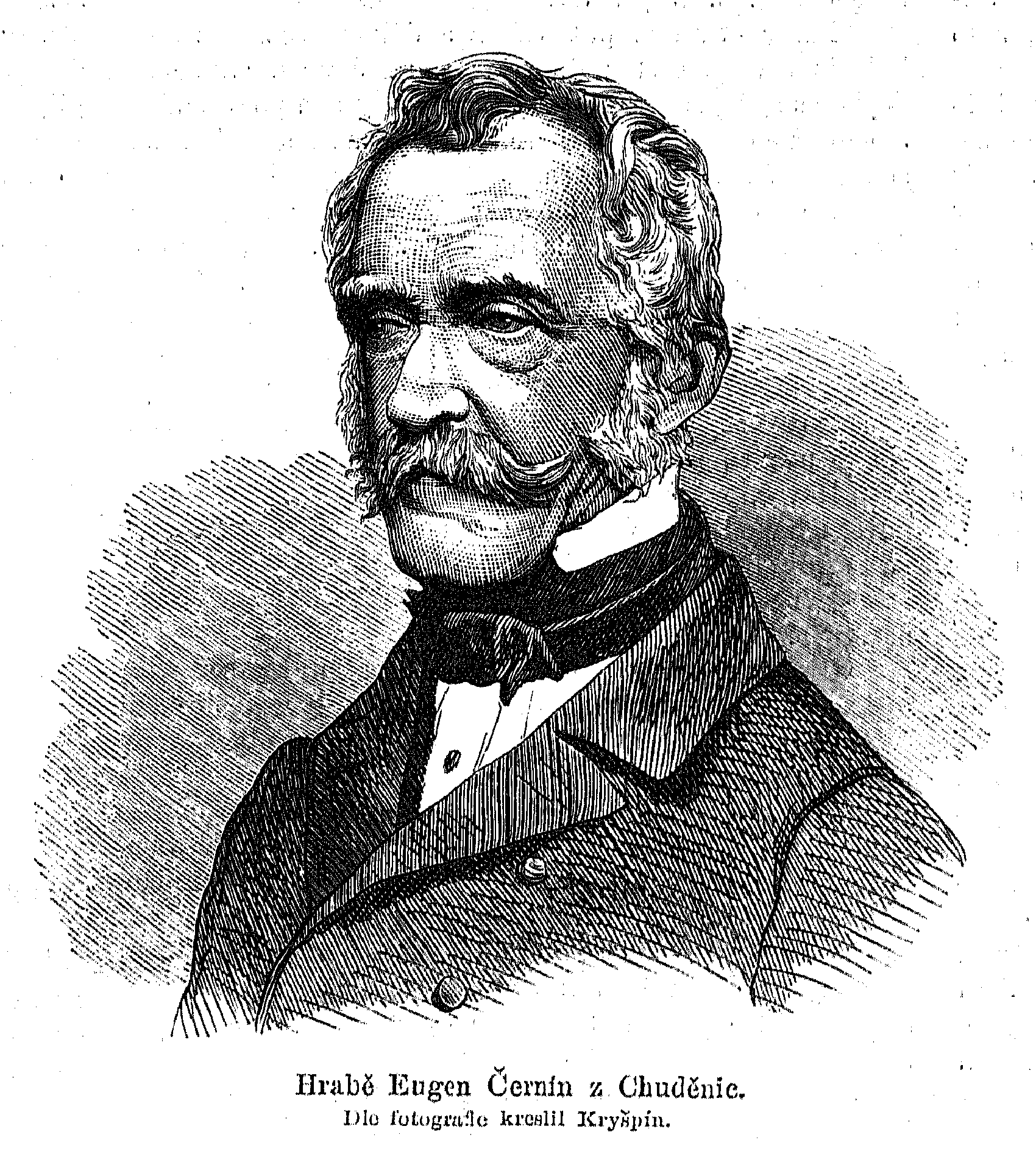 Portrait of Eugen Karl Czernin von und zu Chudenitz (1796 - 1868), in